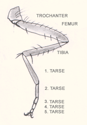 C'est le schéma d'une patte de lépidoptères